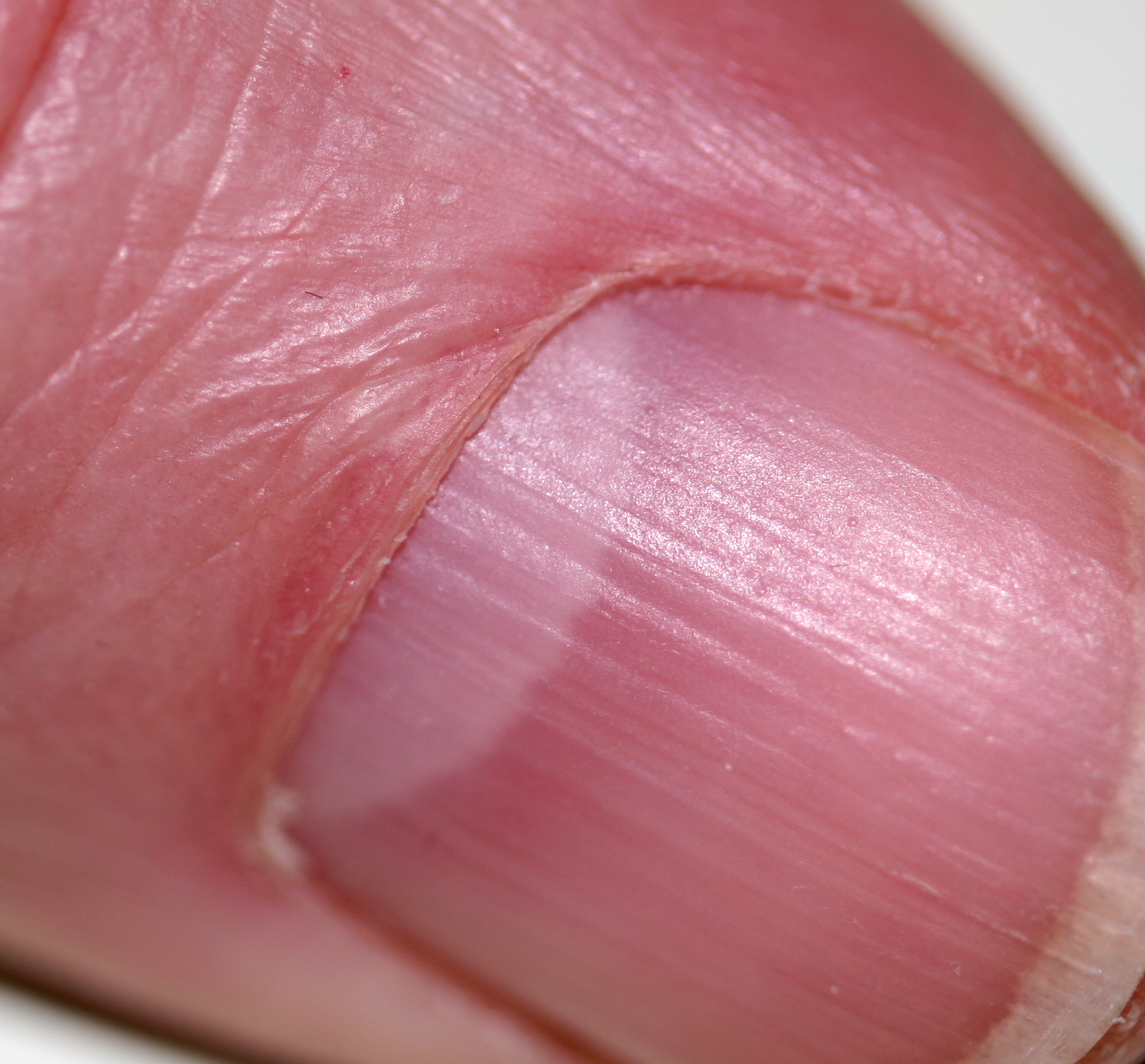 Lunula.